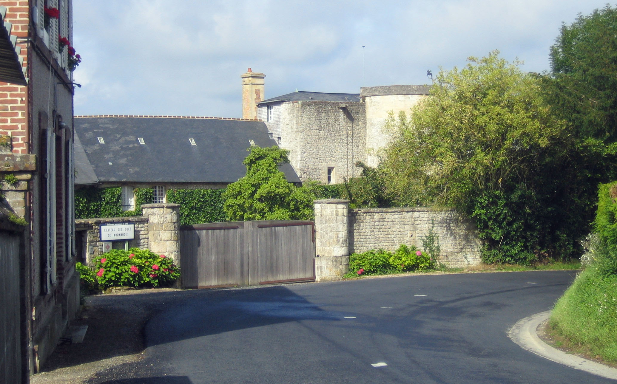 Château de Bonneville-sur-Touques (Calvados, Normandie, France).